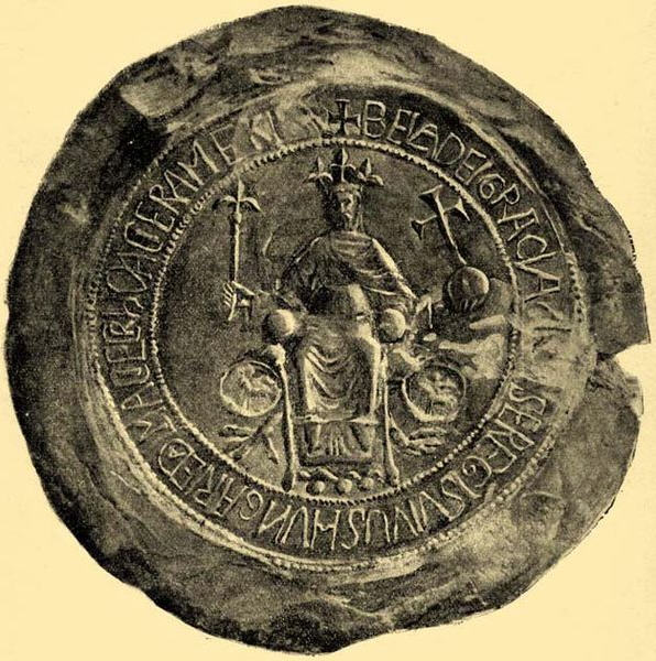 Pečeť Bély III.